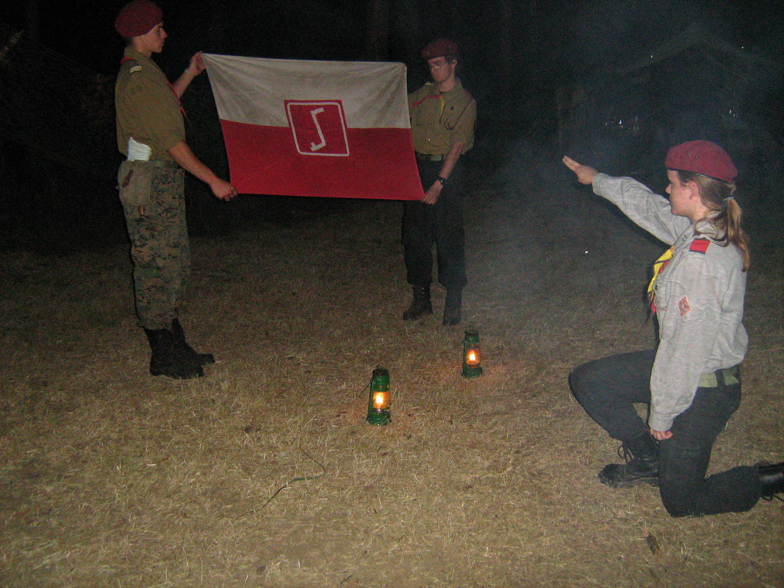 Obrzęd składania Przyrzeczenia harcerskiego w Organizacji Harcerskiej "Rodło". Podczas wypowiadania słów roty, biszkopt klęczy na jednym kolanie, i wyciąga dwa palce nad obrzędową flagę narodową z symbolem Rodła (symbol organizacji) oraz dwa ognie (oznaczające Przyrzeczenie i Prawo harcerskie).